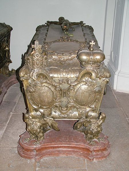 Grab der Kaiserin Eleonore Magdalena